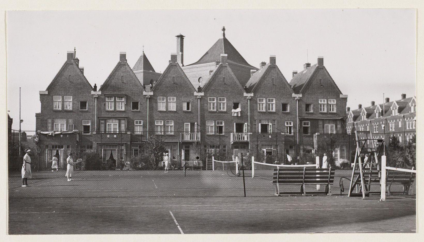 Beschrijving Linnaeushof 95-100 Documenttype foto Vervaardiger Eck, J. van (Jacobus, 1873-1946) Collectie Collectie J. van Eck: foto's Datering september 1937 Geografische naam Linnaeushof Inventarissen Afbeeldingsbestand A01634001178 Generated with Dememorixer